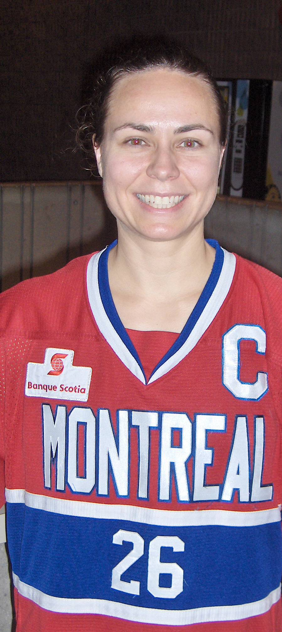 Joueuse des Stars